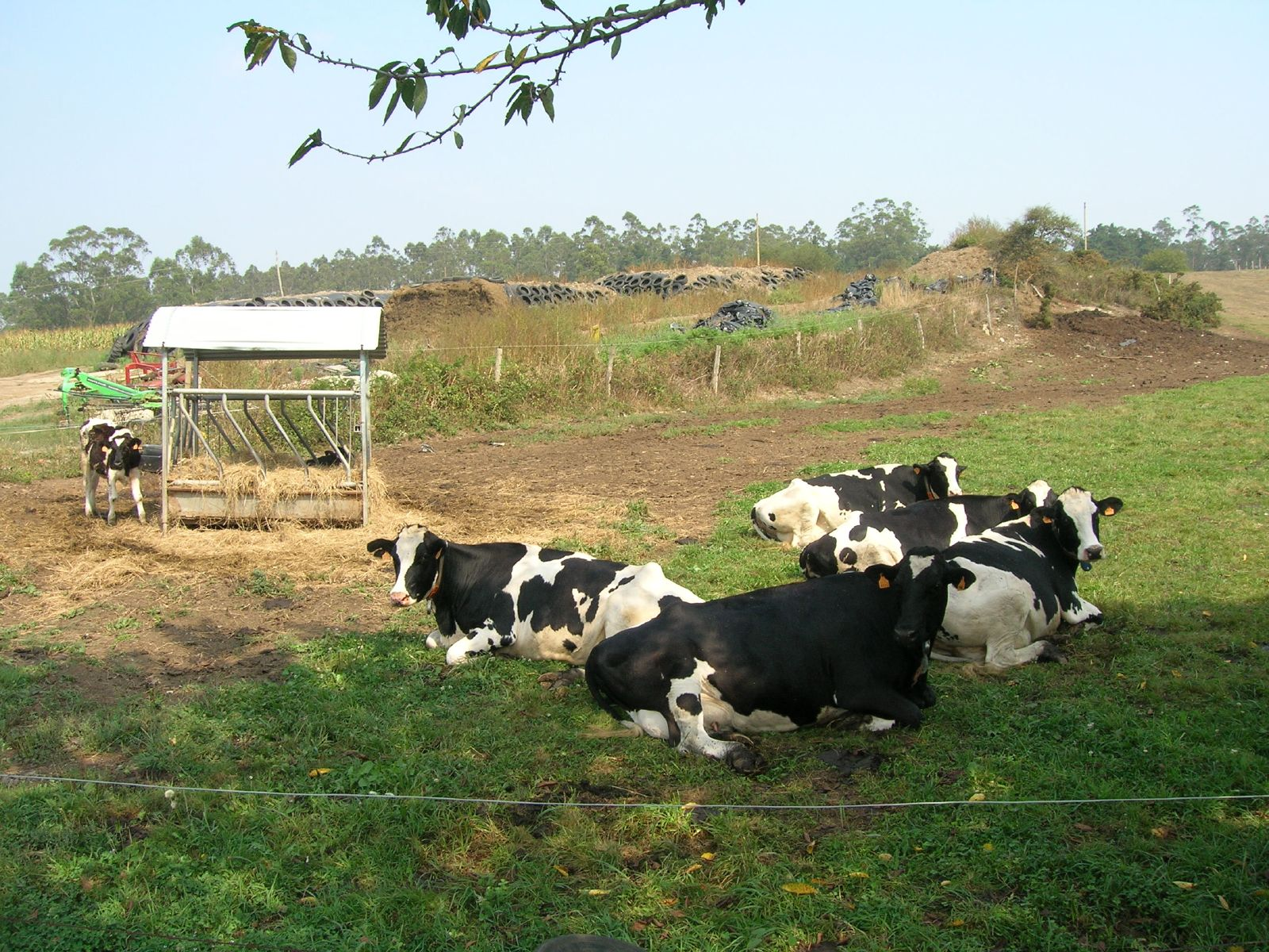 Vacas